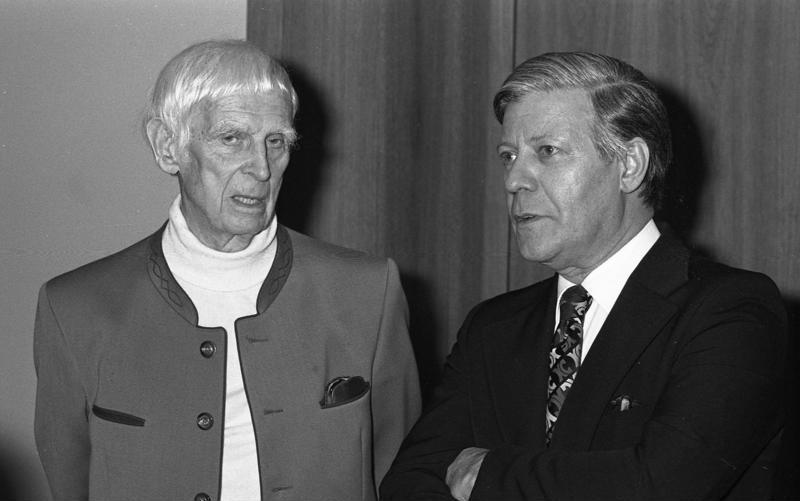 Bundeskanzler Helmut Schmidt empfängt den Bildhauer Prof. Gerhard Marcks anläßlich Aufstellung der Skulptur "Albertus Magnus" im Bundeskanzleramt.